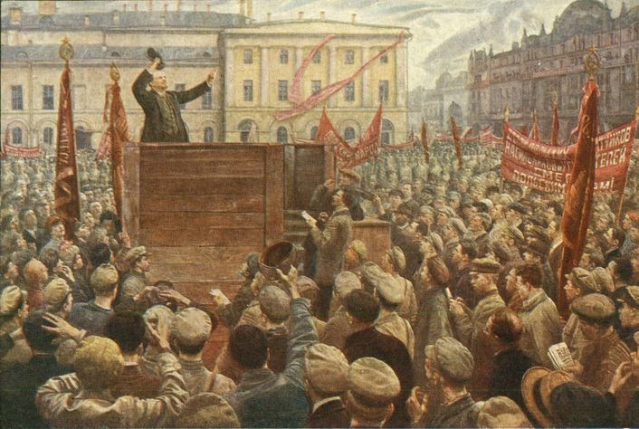 Выступление В.И. Ленина перед частями Красной Армии,отправляющимися на польский фронт в 1920 году.